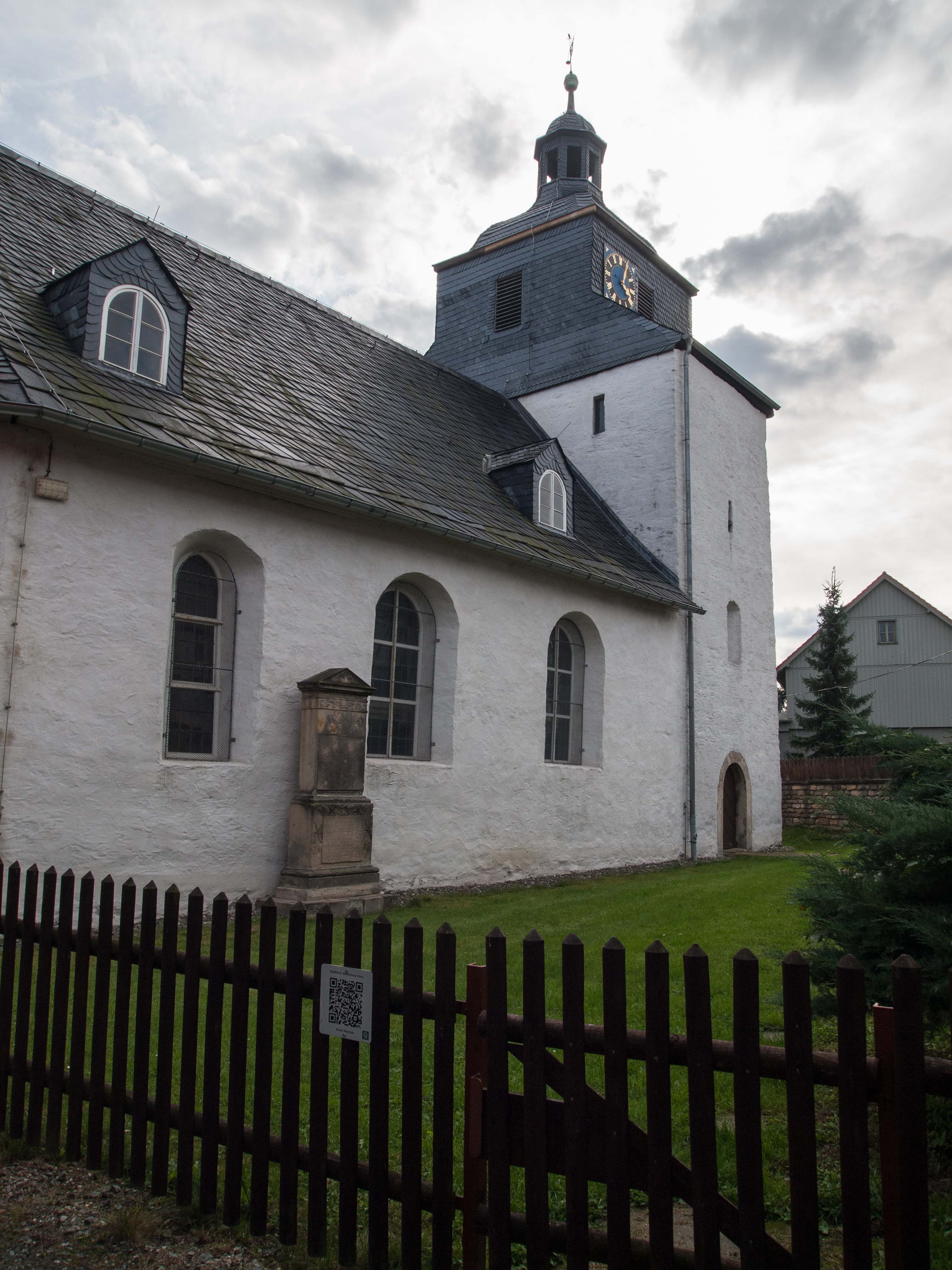 Dorfkirche Wienrode (Stadt Blankenburg, Landkreis Harz; Sachsen-Anhalt) QR code am Zaun